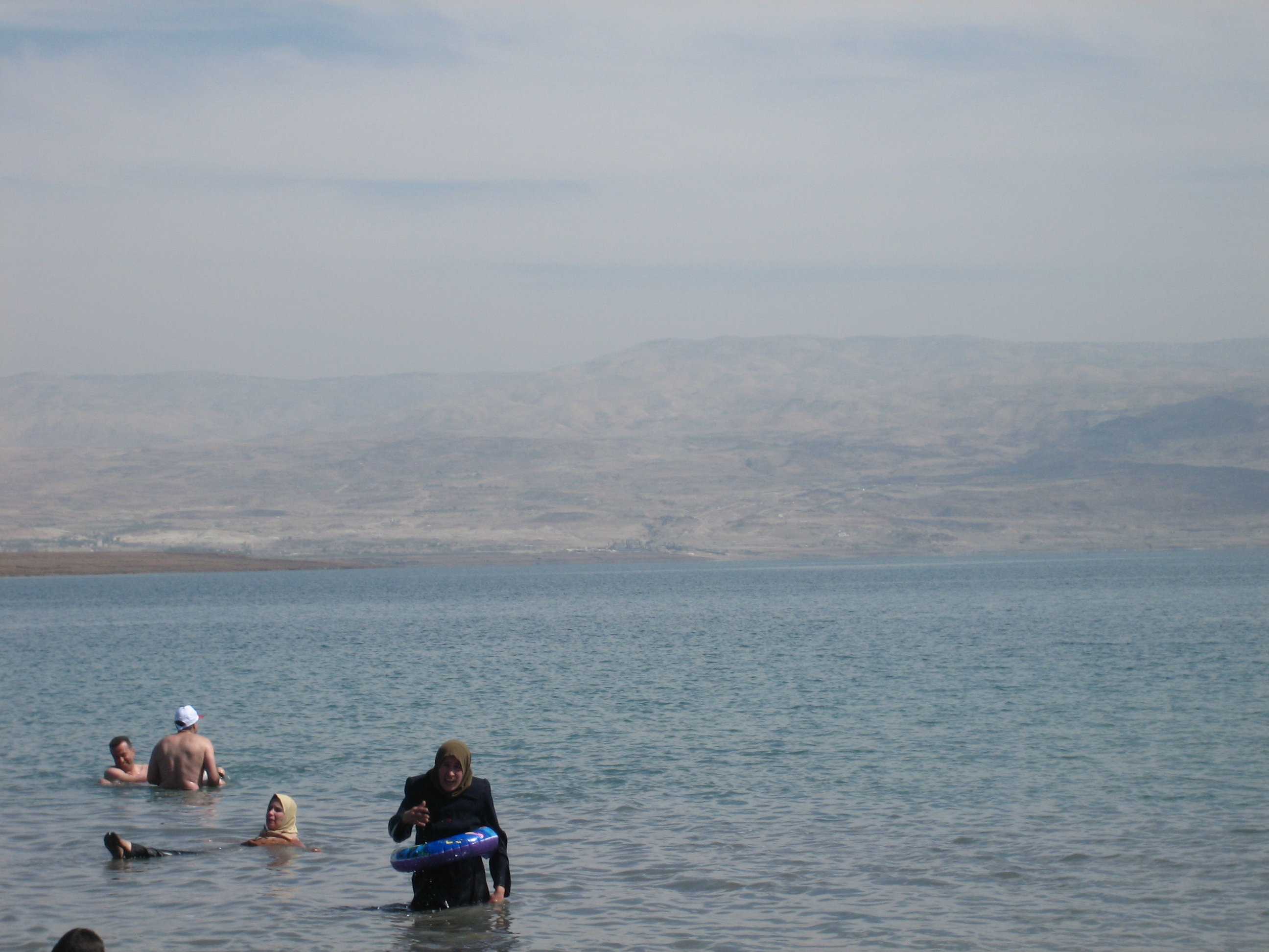 Arab family at the Dead Sea "Qalya" beach, Israel / Arapska obitelj na plaži Kalija na Mrtvom moru, Izrael